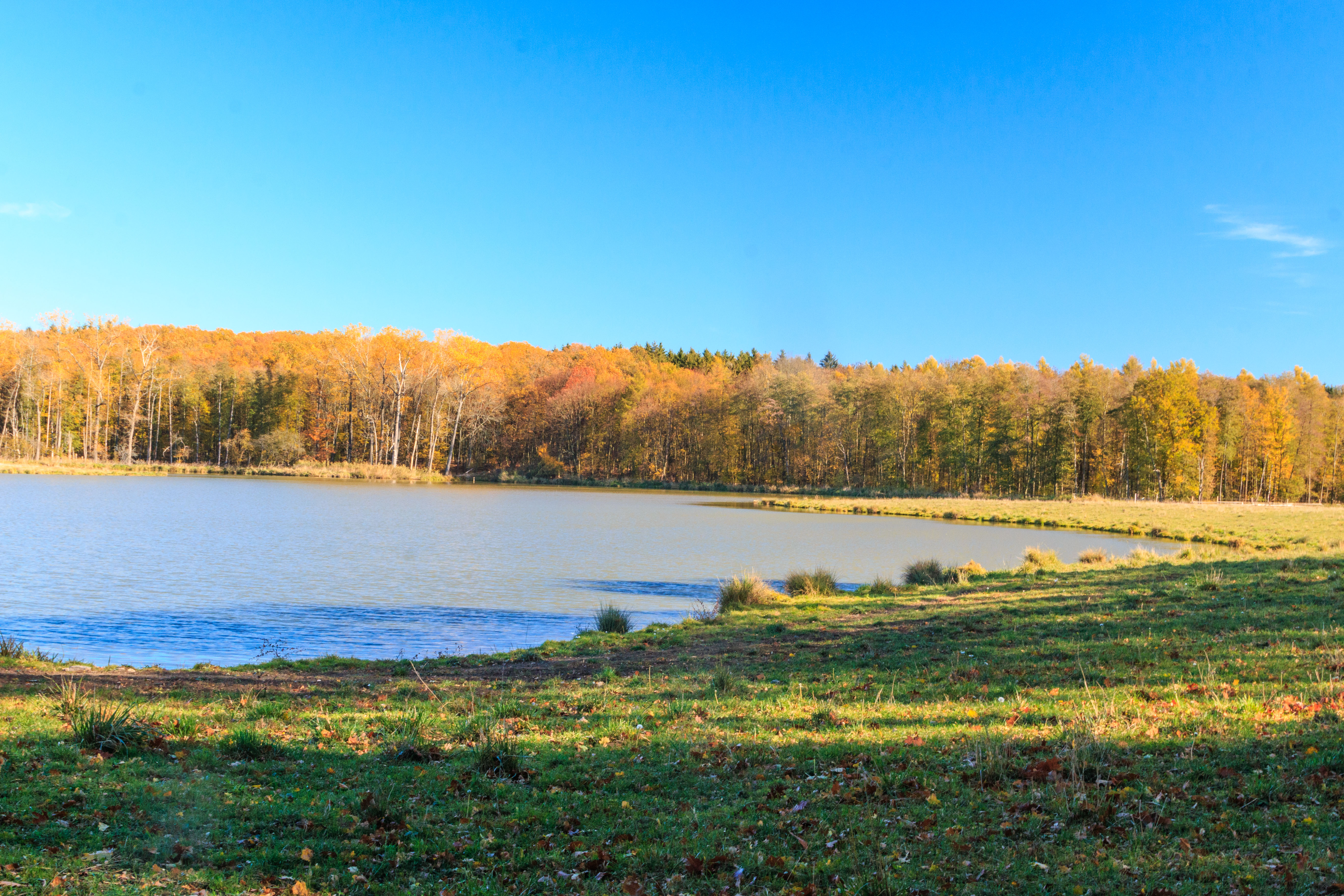 Nové rybníky u Hasiny